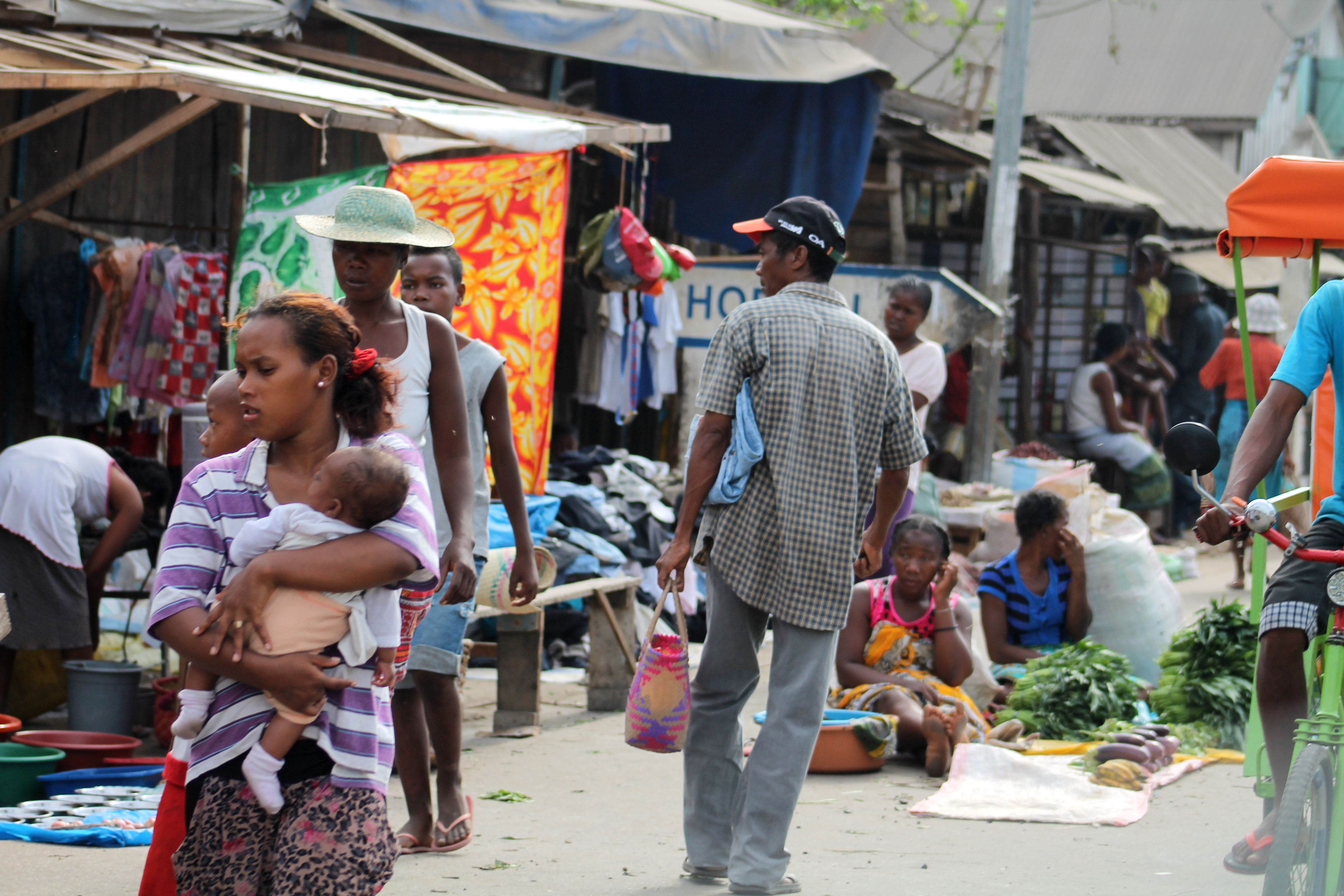 Sakalava